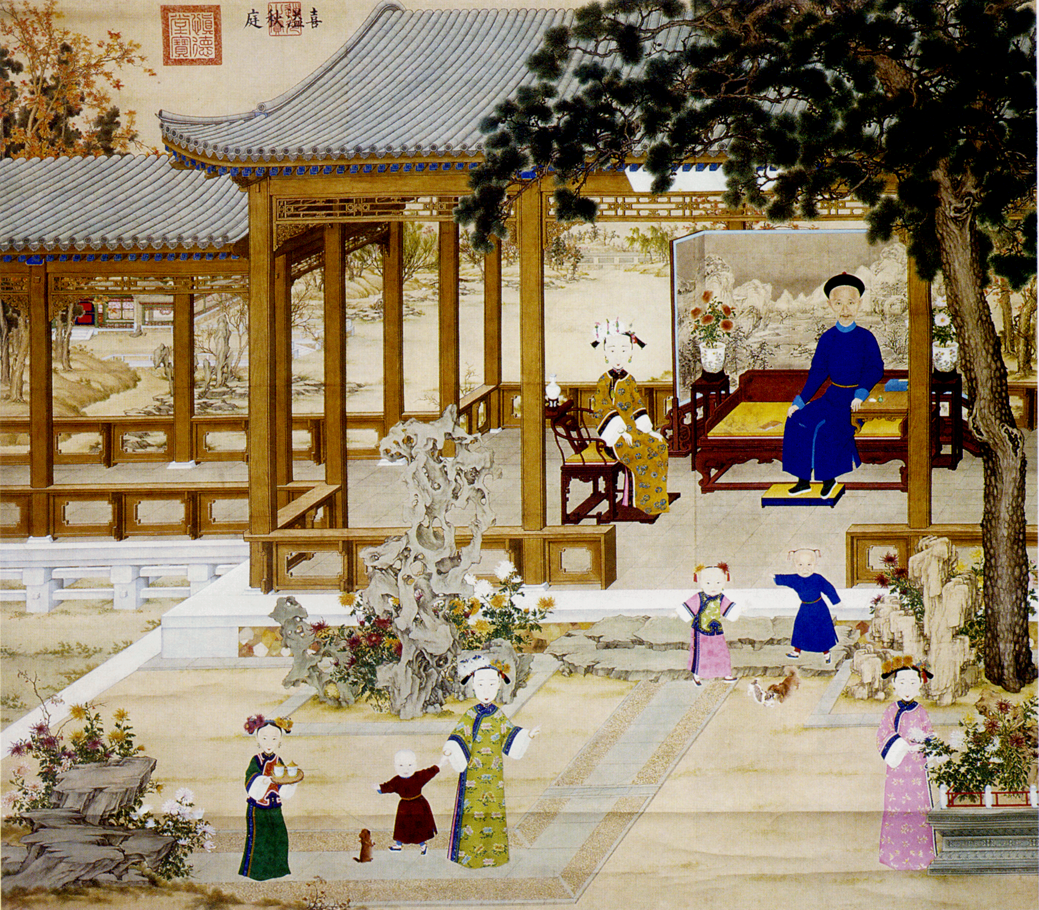 中文（中国大陆）: 道光帝及后妃子女肖像